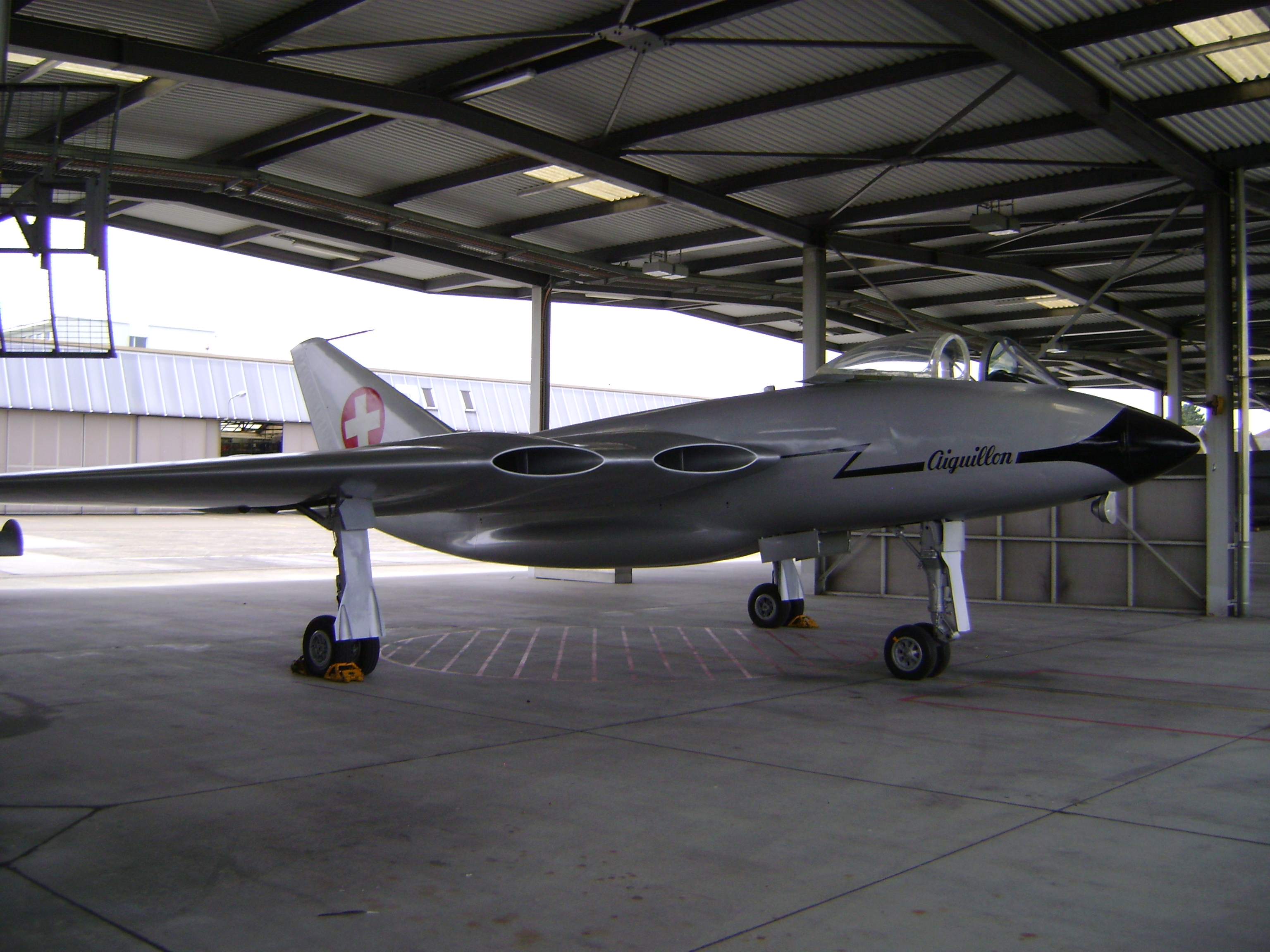 N-20 on QRA